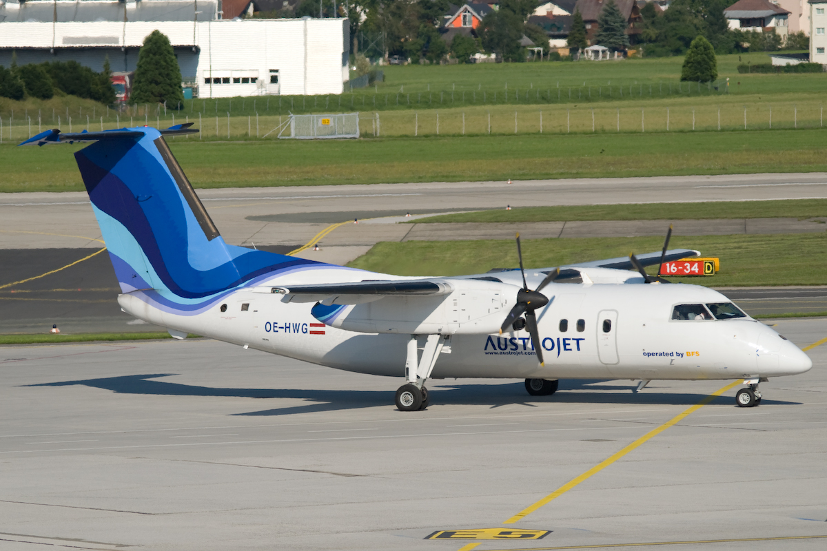 Austrojet Dash 8-100 in Salzburg